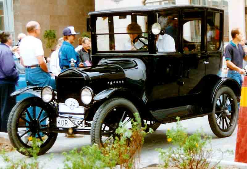 Ford Model T Centerdoor Sedan 1921